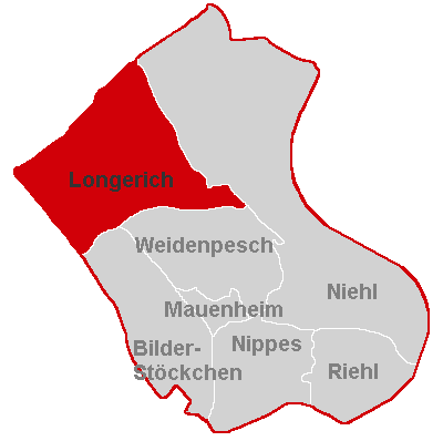 Lagekarte Longerich im Stadtbezirk Köln-Nippes